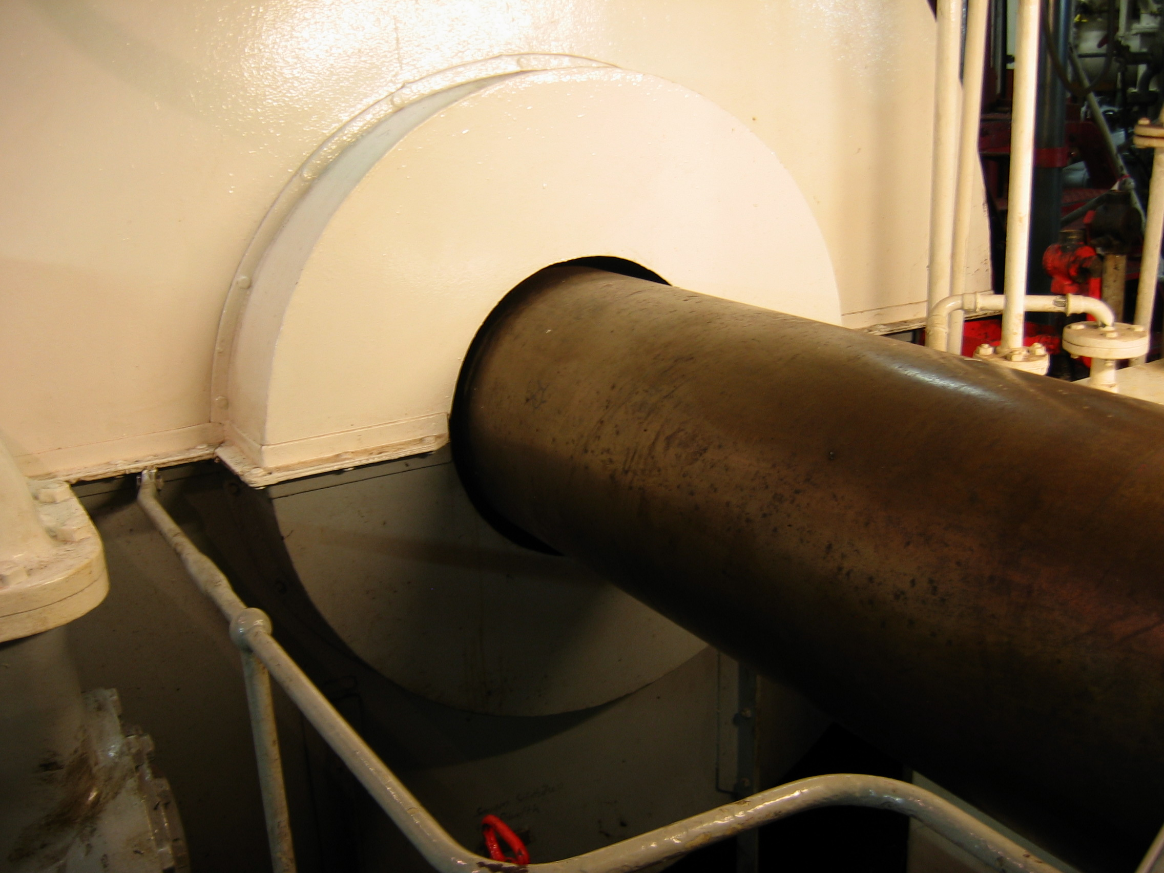 Wyjście wału śruby z silnika głównego MS Cap San Diego